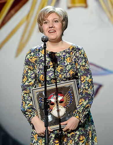 Фестиваль «Золотая маска» 2015 года